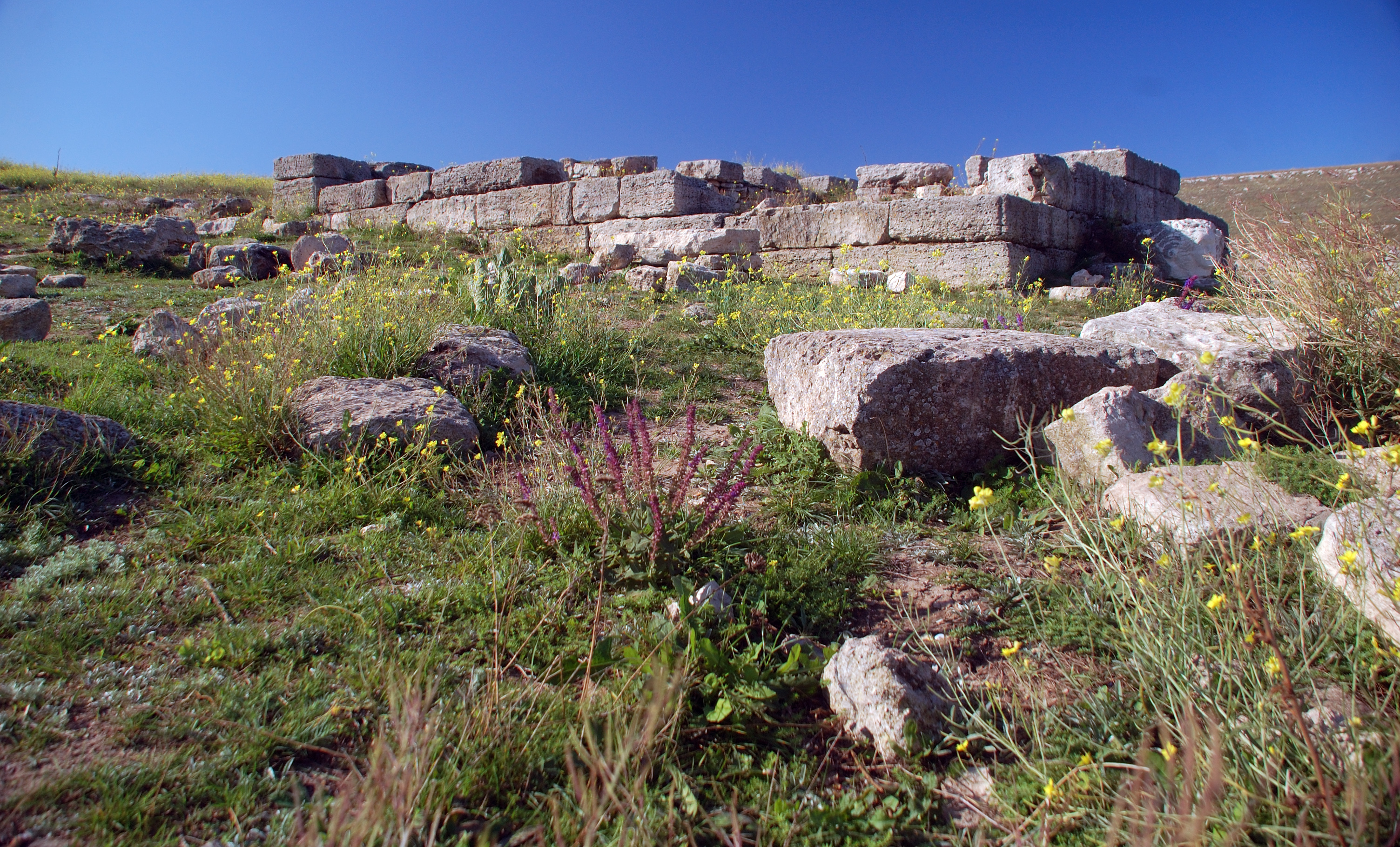 Древнегреческие развалины